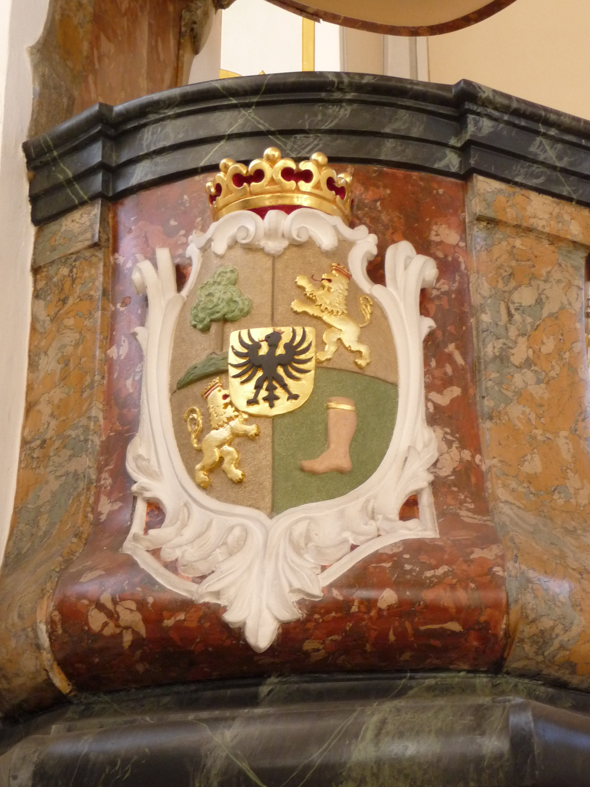 Schlosskirche Fußgönheim, Rheinland-Pfalz